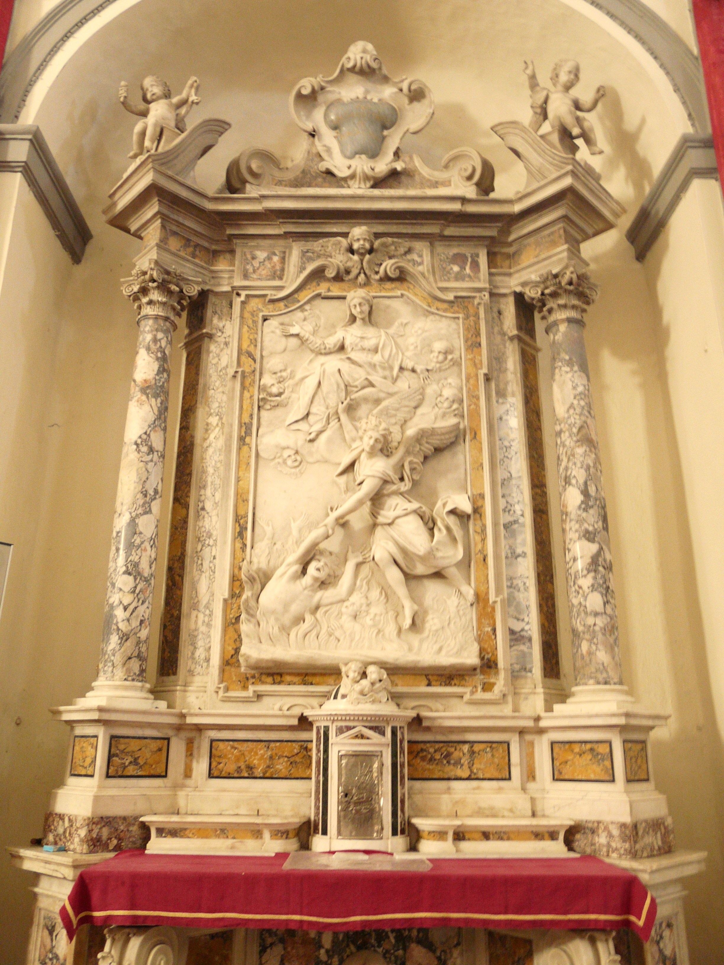 Chiesa-Santuario di San Remigio, Fosdinovo, Toscana, Italia